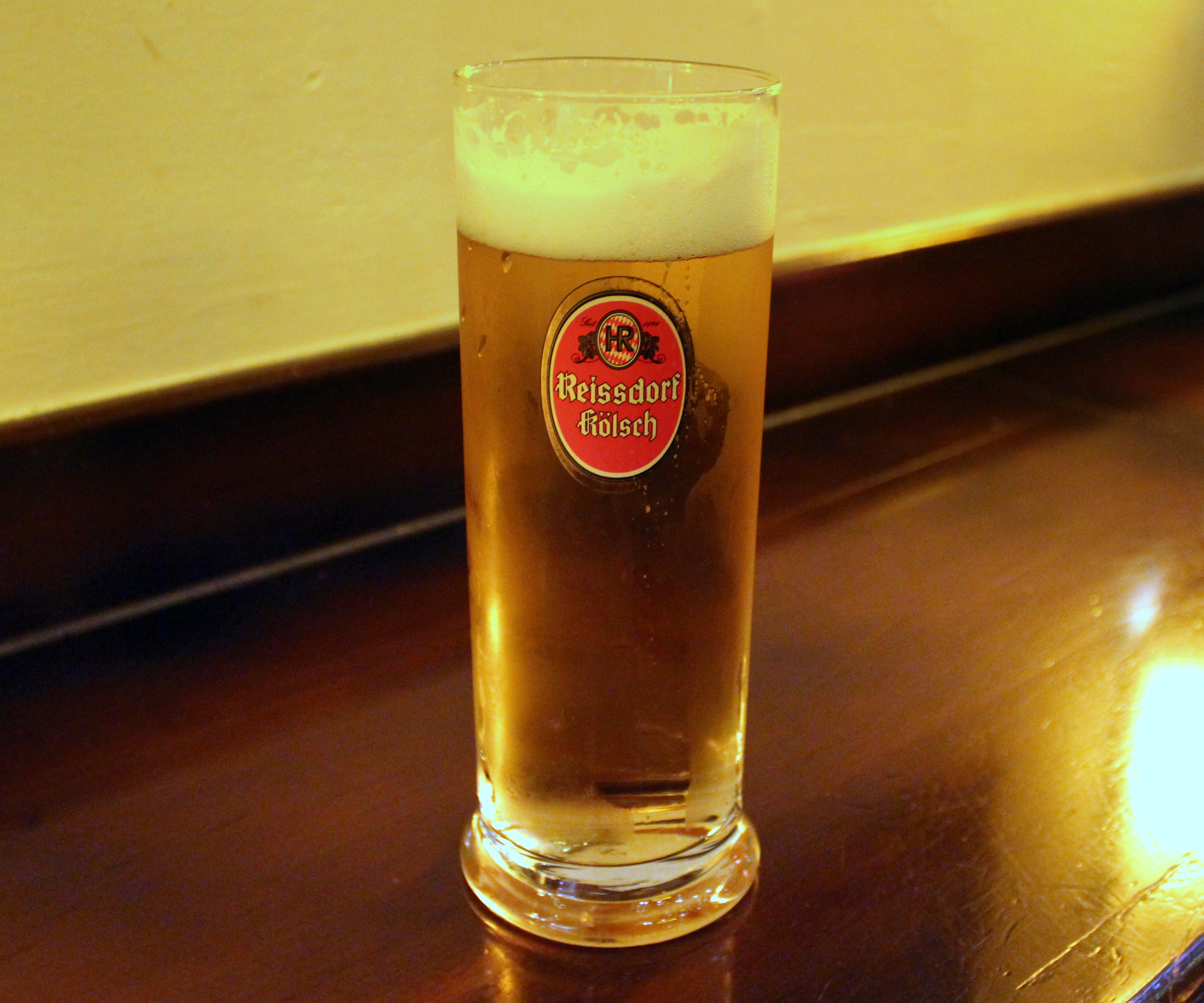 REISSDORF KOLSCH KOLN GERMANY JUNE 2013